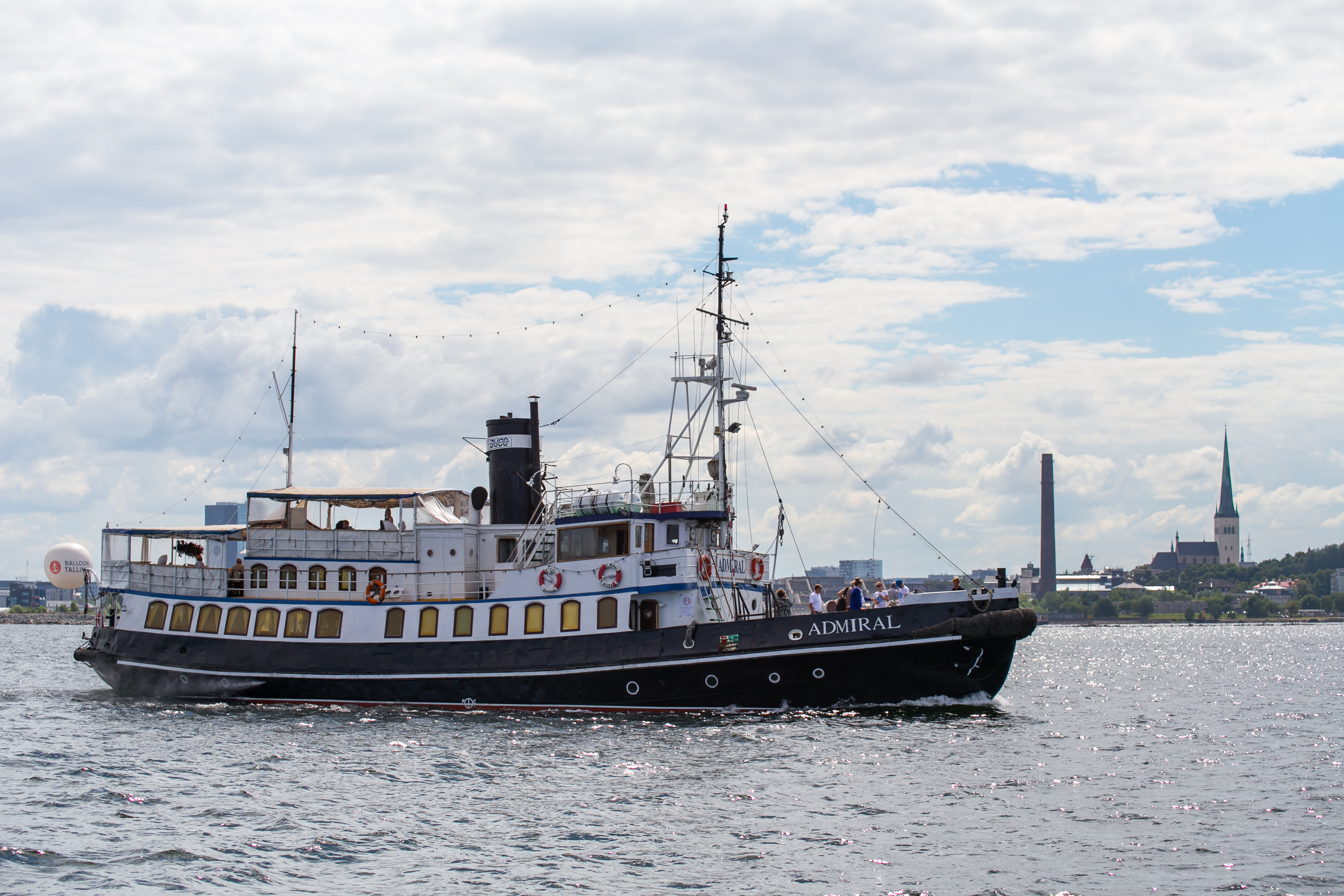 Пароход "Адмирал" на Таллинском заливе